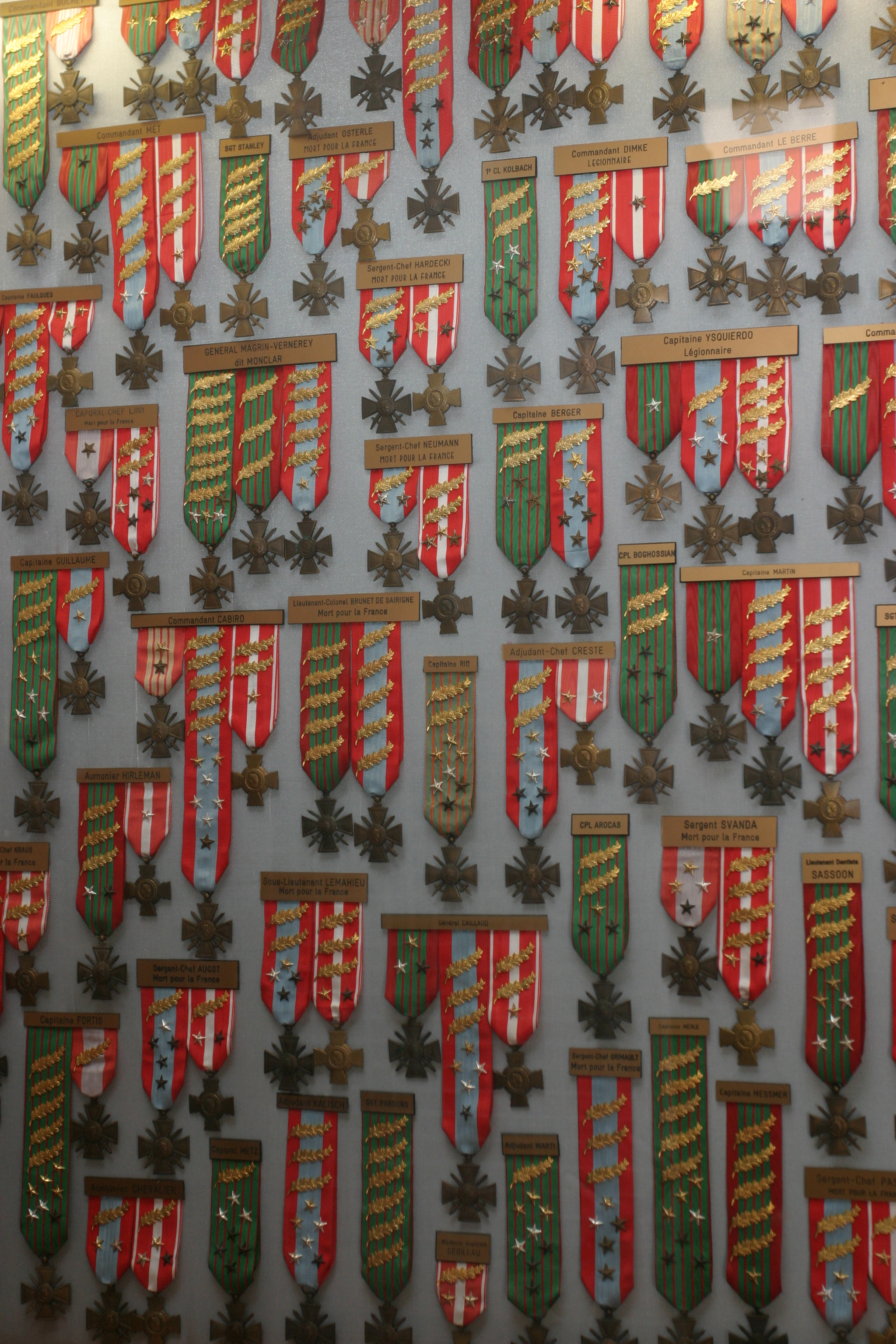 Quelques décorations d'officiers, de sous-officiers et de Légionnaires au Musée de la Légion étrangère